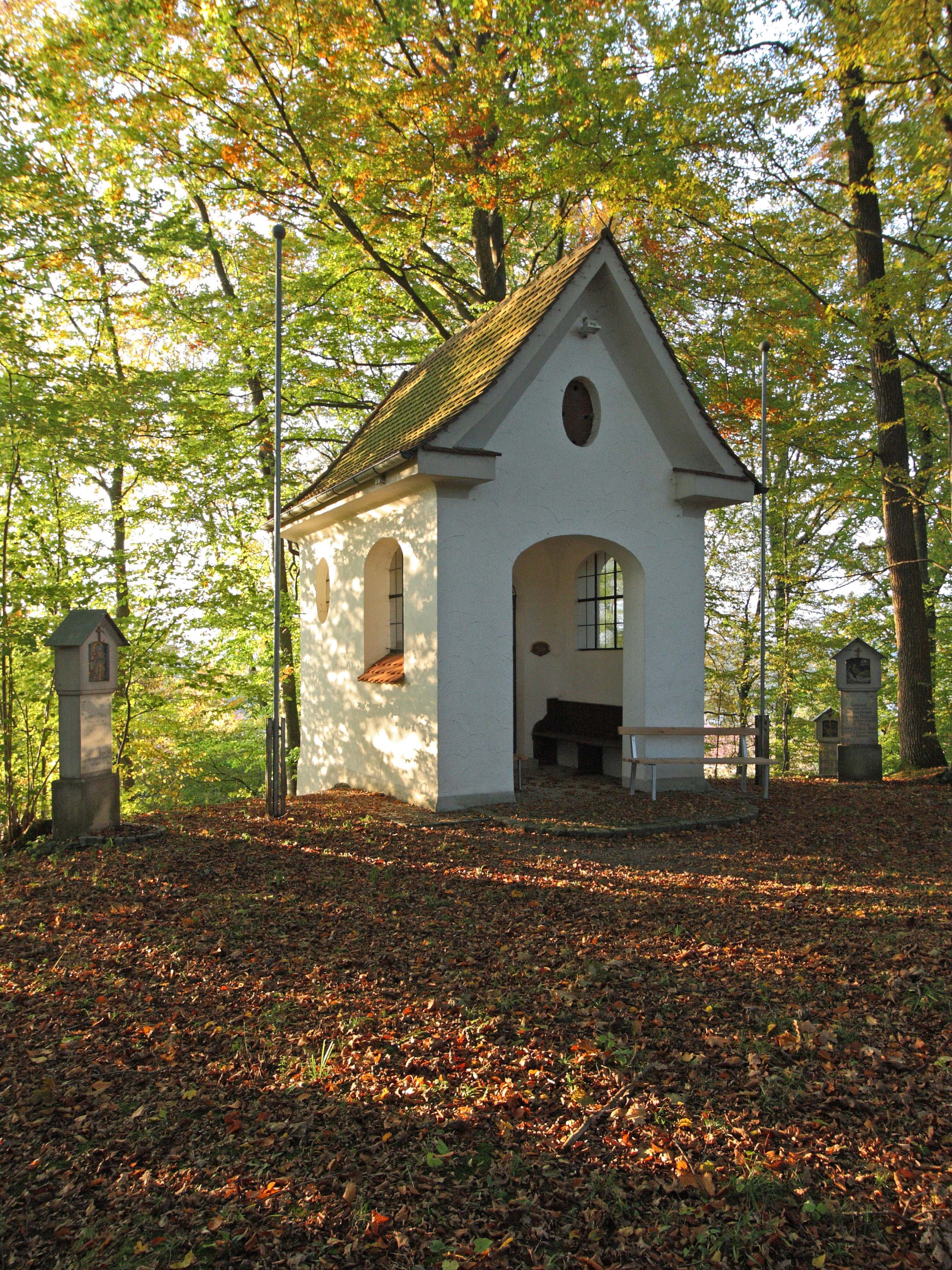 Kriegergedächtniskapelle in Nattenhausen, Gemeinde Breitenthal; nach Westen gerichtete Kapelle am Osthang der Bergzunge